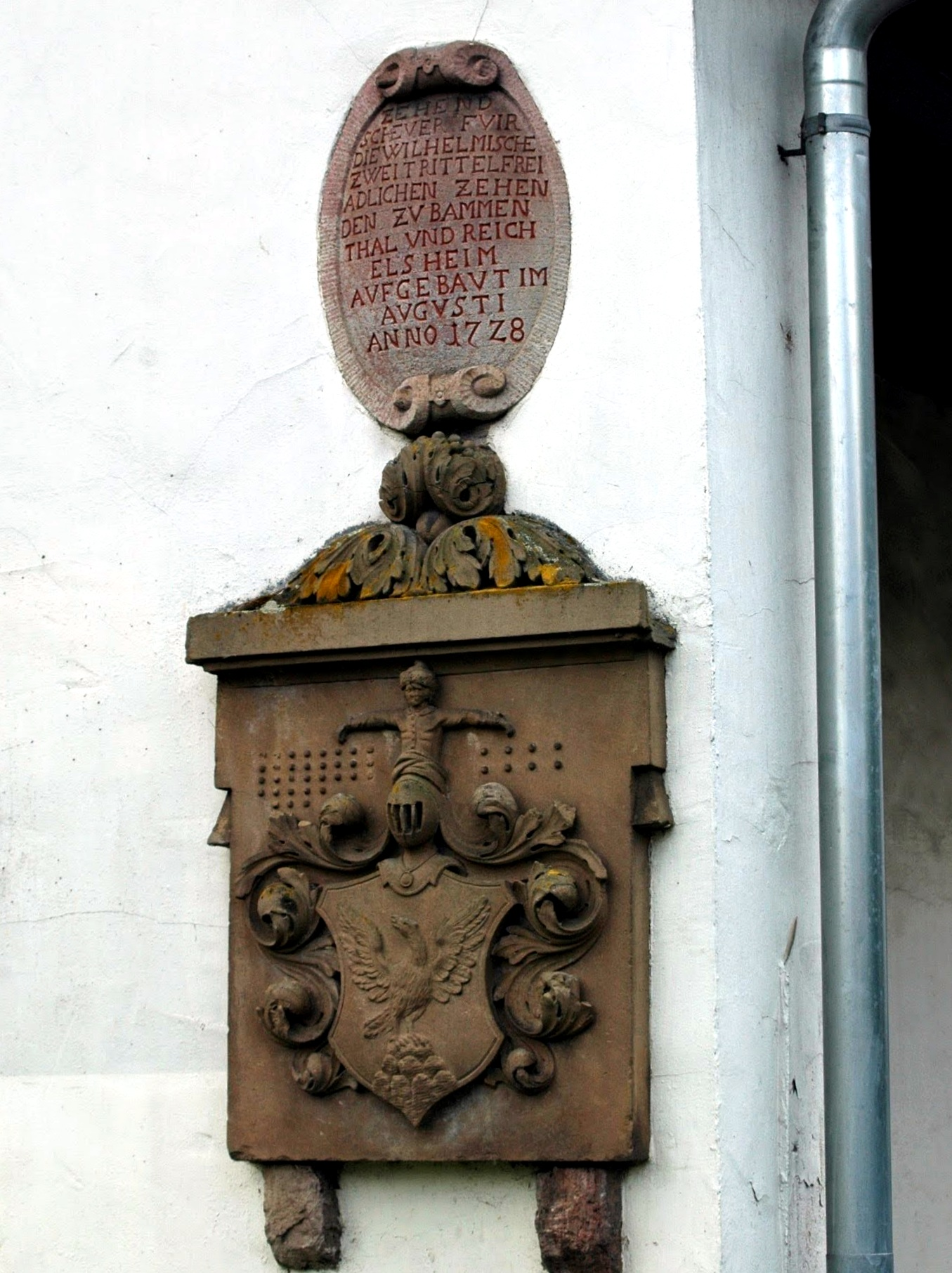 Tafel in Bammental